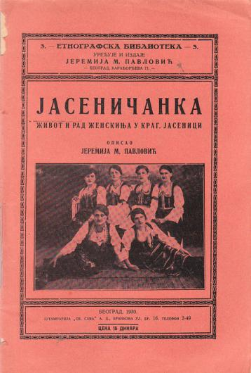 Јасеничанка: живот и рад женскиња у Крагујевачкој Јасеници, 1930.